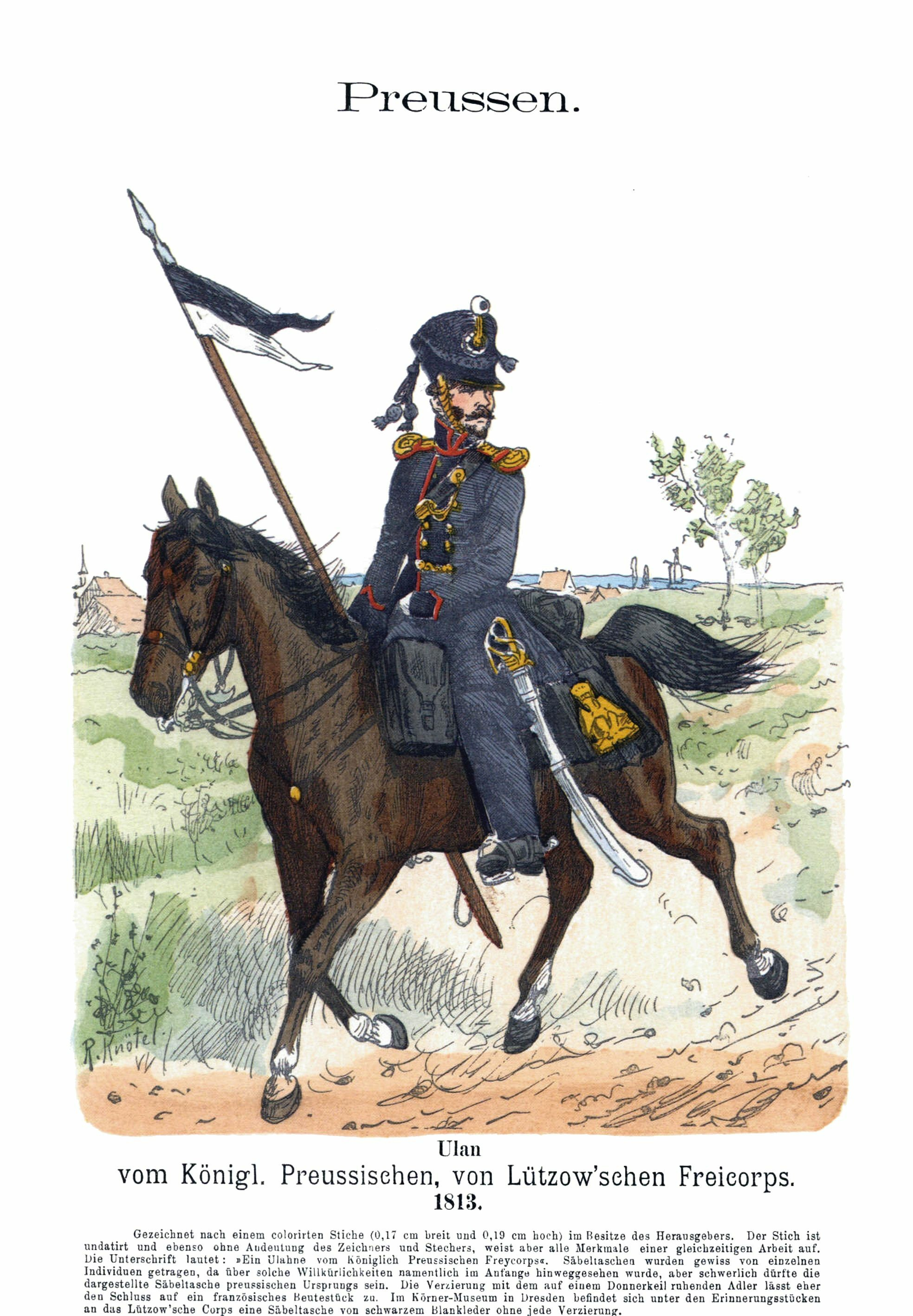 Иллюстрация Рихарда Кнотеля